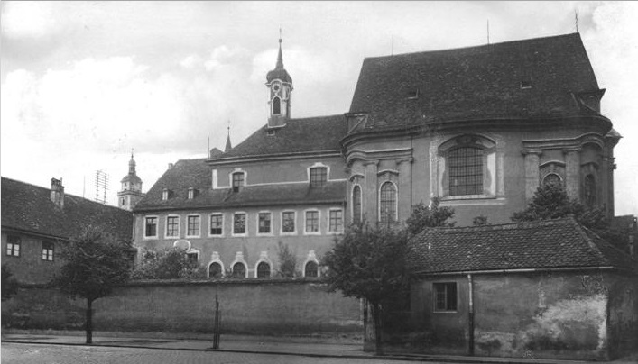 Historische Aufnahme der 1945 zerstörten Augustinerklosteranlage in Ingolstadt mit der Rokoko-Klosterkirche